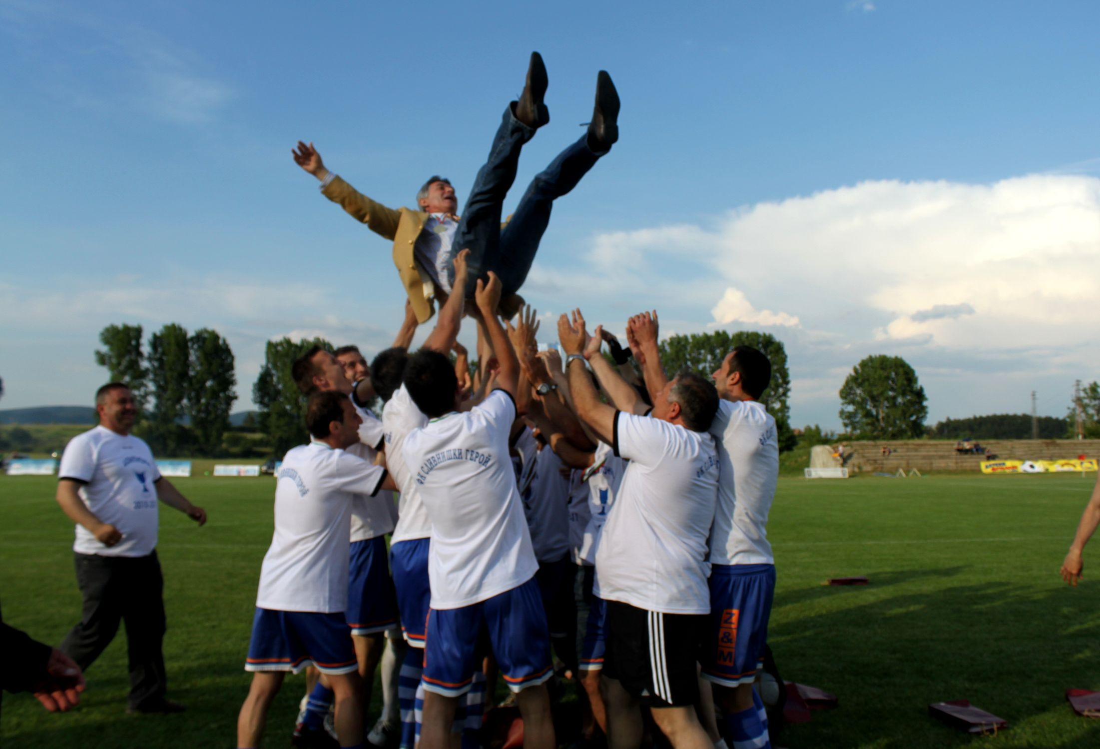 Венцислав Рангелов е хвърлен във въздуха от своите играчи,след като Сливнишки герой (Сливница) става шампион на "В" ЮЗ АФГ 2010/2011